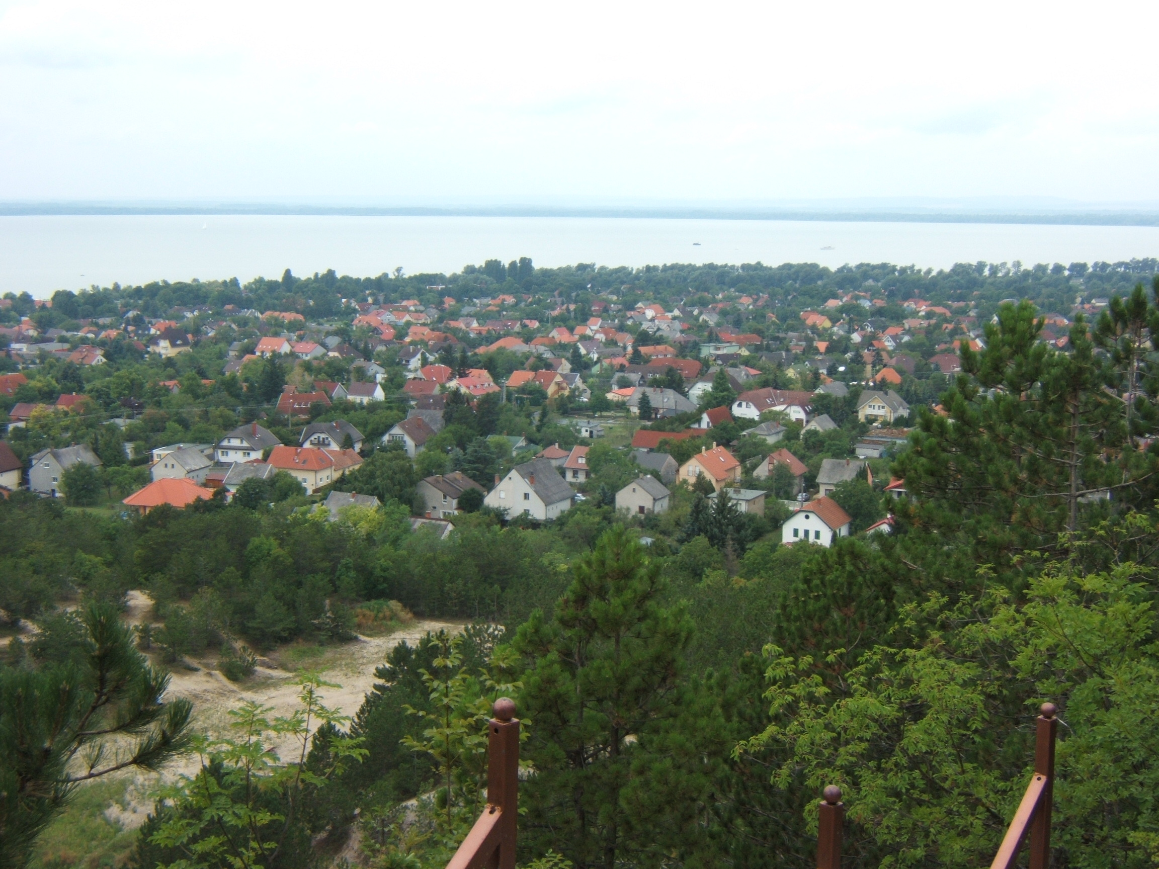 Vonyarcvashegy, kilátás a fénykereszttől